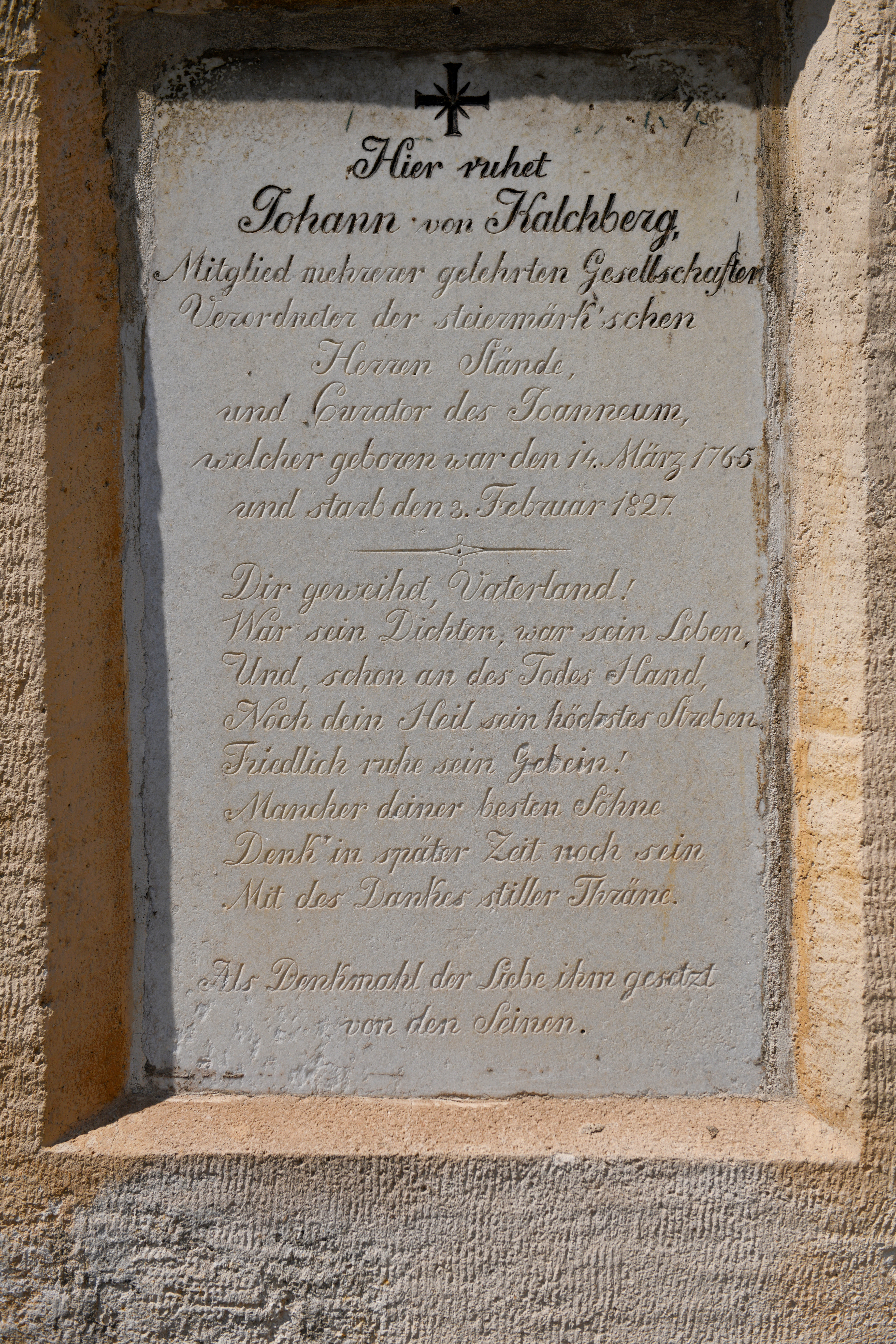 Die Kirche Maria Himmelfahrt am Leech in Graz Geidorf,Grabdenkmal Johann von Kalchberg